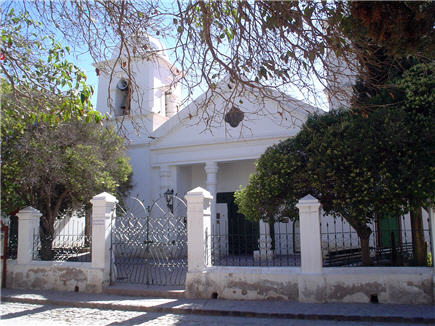 Iglesia de Humahuaca, provincia de Jujuy